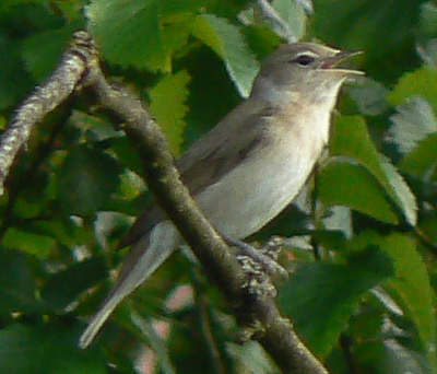 Garden Warbler (Sylvia borin), Bedfords park, Romford, Essex, UK